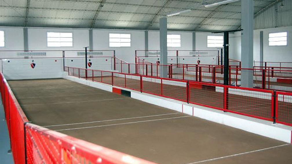 Estadio de Bocha